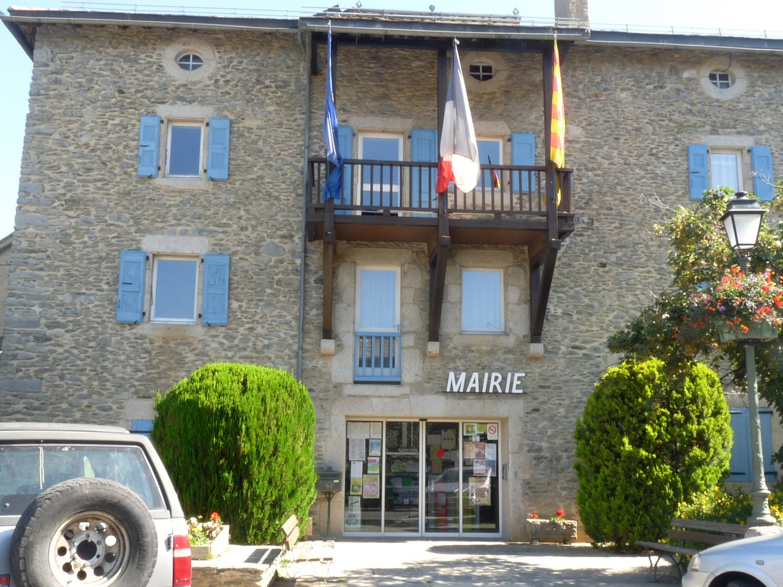 Mairie d'Osséja, Pyrénées-Orientales, France